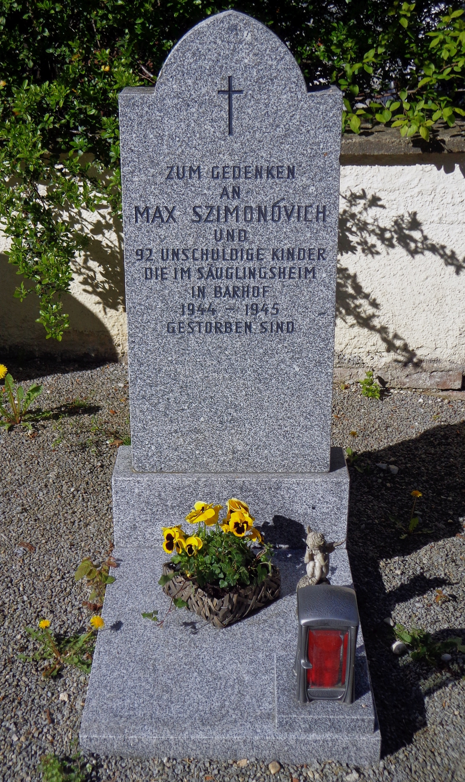 Friedhof Hader (Ruhstorf an der Rott): Denkmal für die 1944-1945 im NS-Kinderheim Barhof ums Leben gekommenen Kinder, siehe dazu weiterführend Anna E. Rosmus, Wintergrün. Verdrängte Morde, Labhard, Konstanz 1993, ISBN 3-926937-11-4.